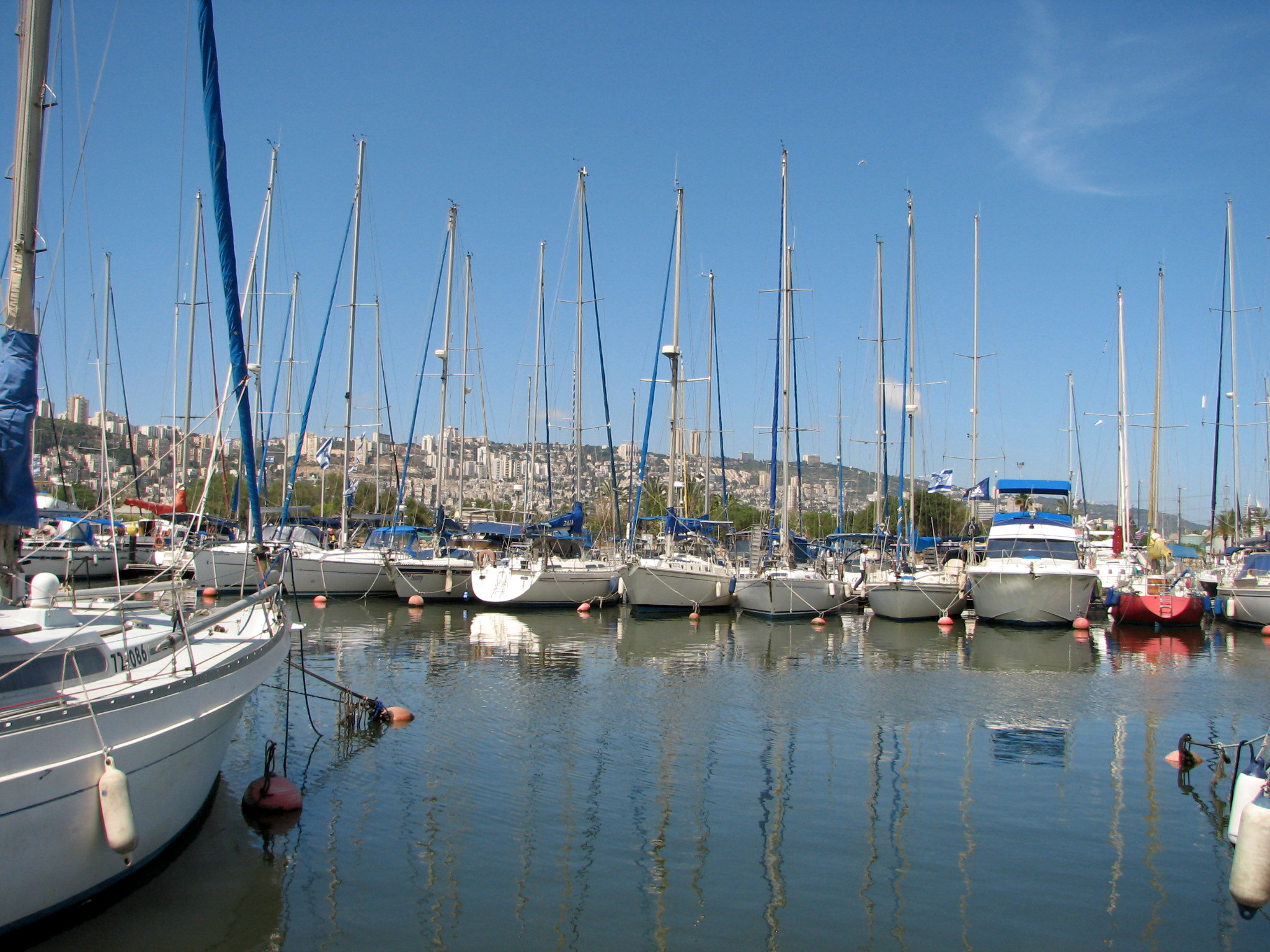 The fishing dock at the port of Kishon serves fishermen and boats and a tourist gateway to the Park Kishon. "Yacht harbor" מעגן הדיג ליד נמל הקישון משרת דייגים ובעלי ספינות וכן מהווה שער לאתר התיירות "פארק הקישון".ומעגן יכטות בתי חיפה בינות לתרני היכטות